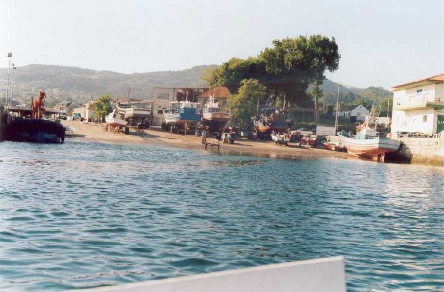 Vista de Moaña, Pontevedra, Galicia, España. Puerto de Meira.